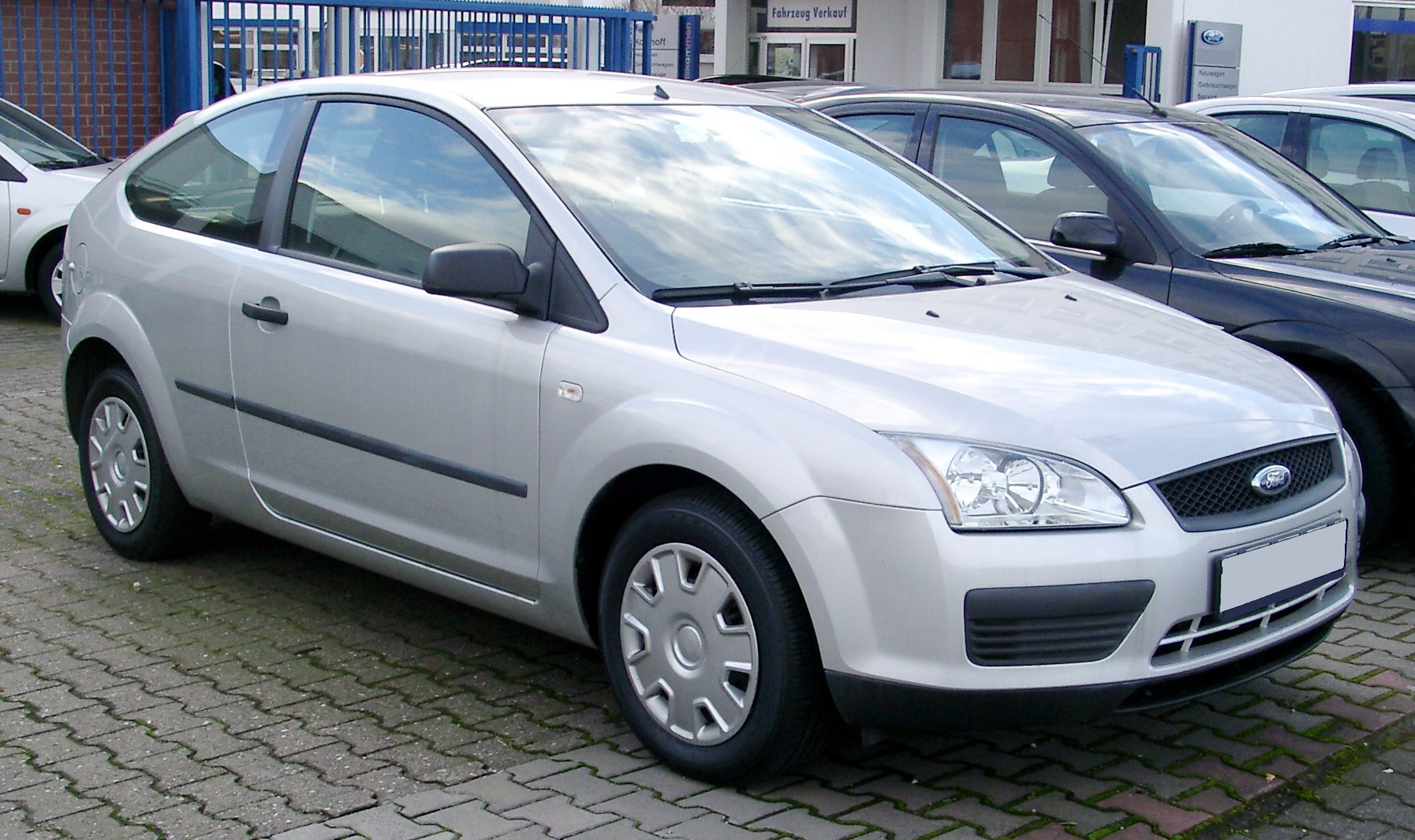 Ford Focus, 2. Generation